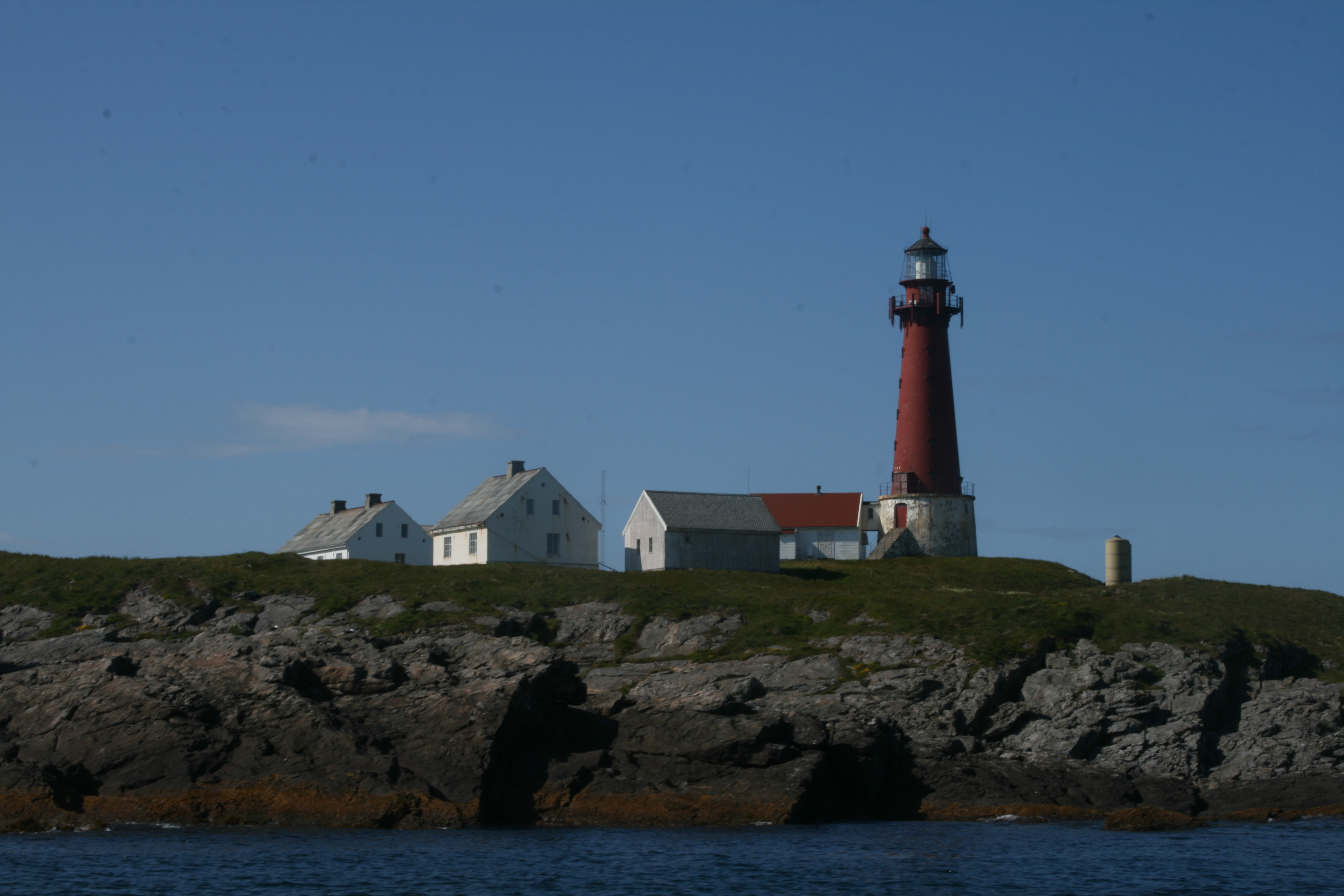 Skomvær fyr (lighthouse) in Røst, Norway